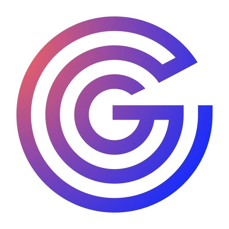 Nouveau logo de l'Athénée Royal Gatti de Gamond (2020)